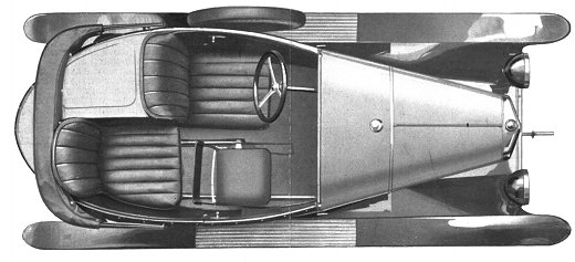 Vue de dessus de la Citroen 5HP Torpedo T3-1 montrant la disposition des trois sieges